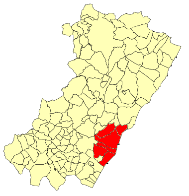 Mapa de municipios del área metropolitana de Castellón, en Castellón (España)